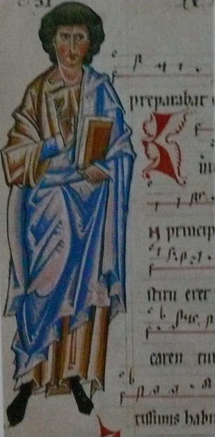 Jan Evangelista